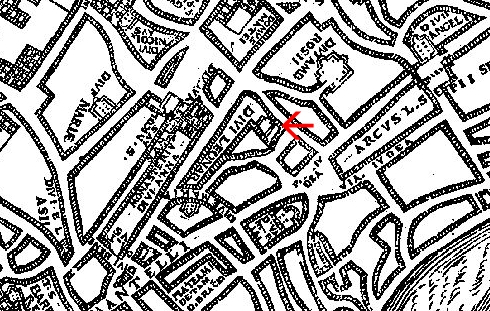 Pianta di Bufalini